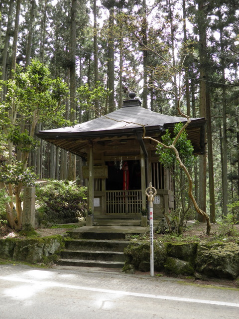 奈良県吉野郡黒滝村地蔵峠にある地蔵堂